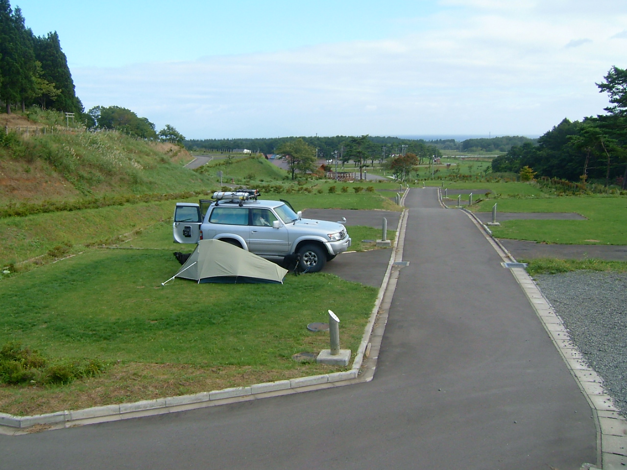 夜越山オートキャンプ場